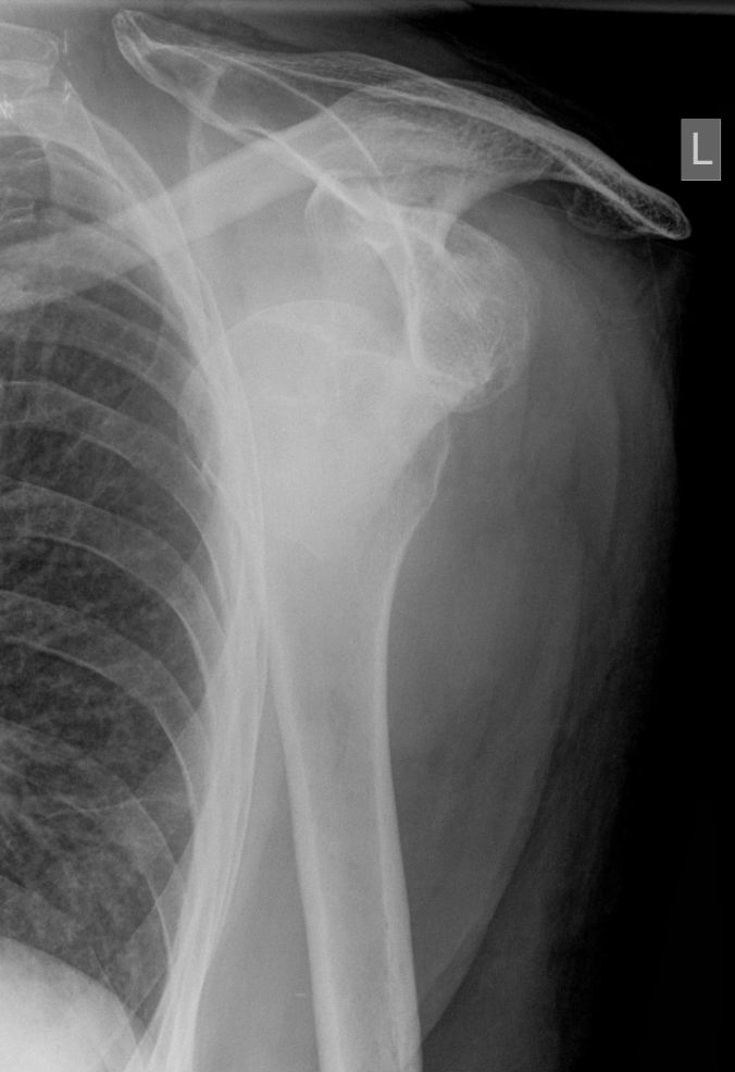 Typische Schulterluxation nach vorne unten.